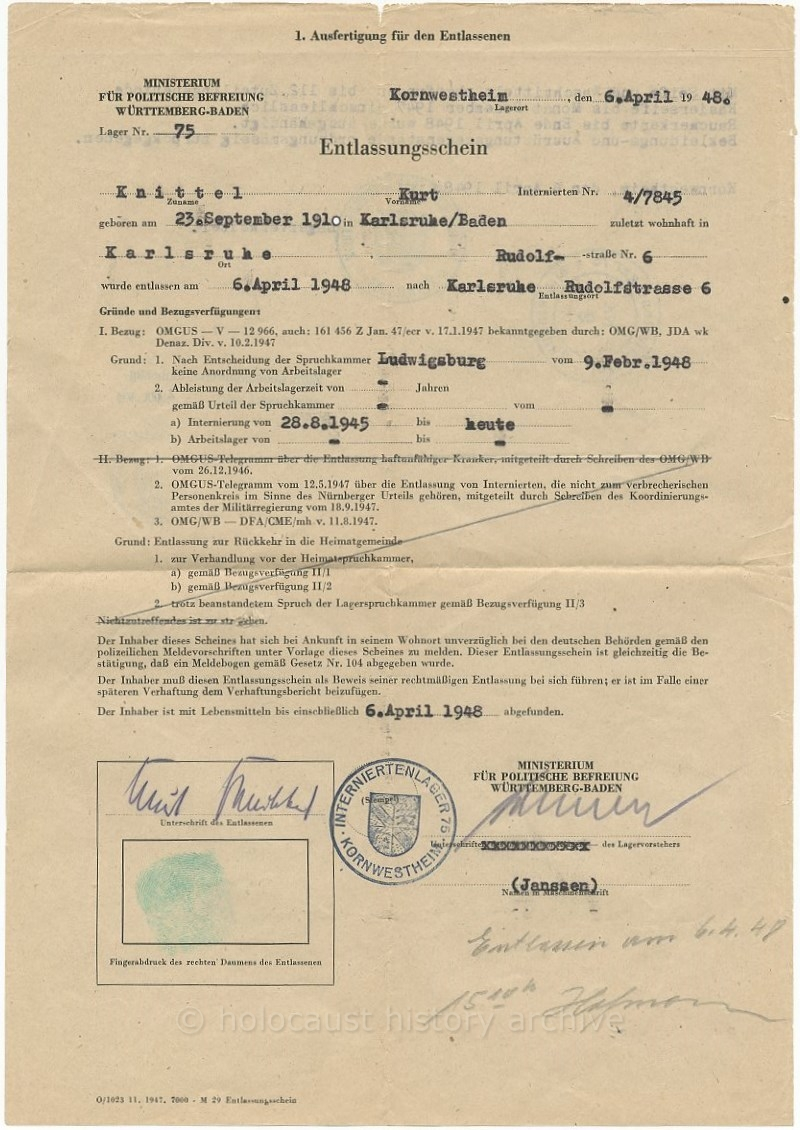 Kurt Knittel Internierung 1948 Vorderseite